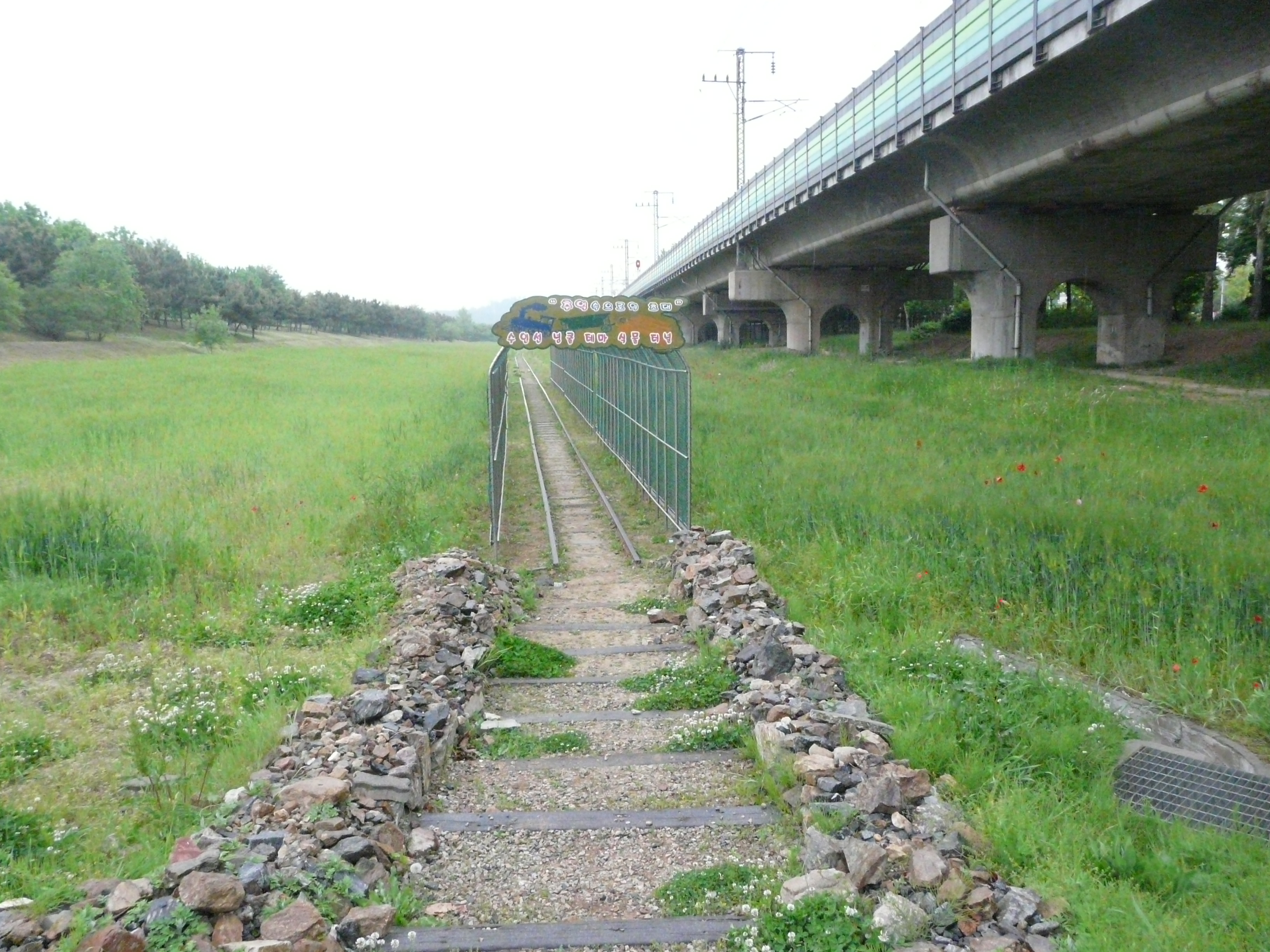 Ansan, Gyeonggi-do